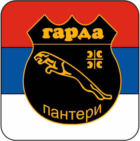 Amblem